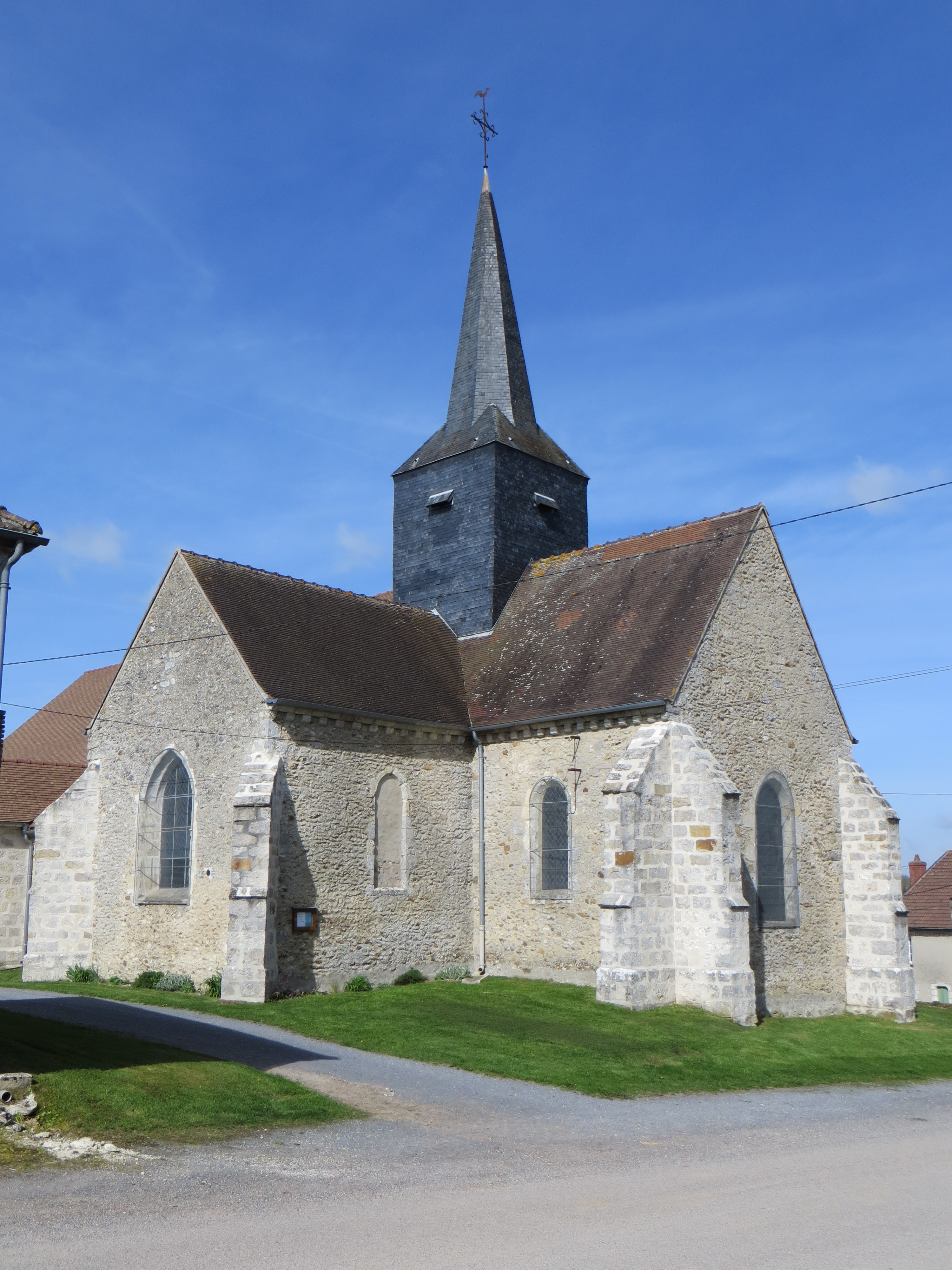 Vue générale de l'église